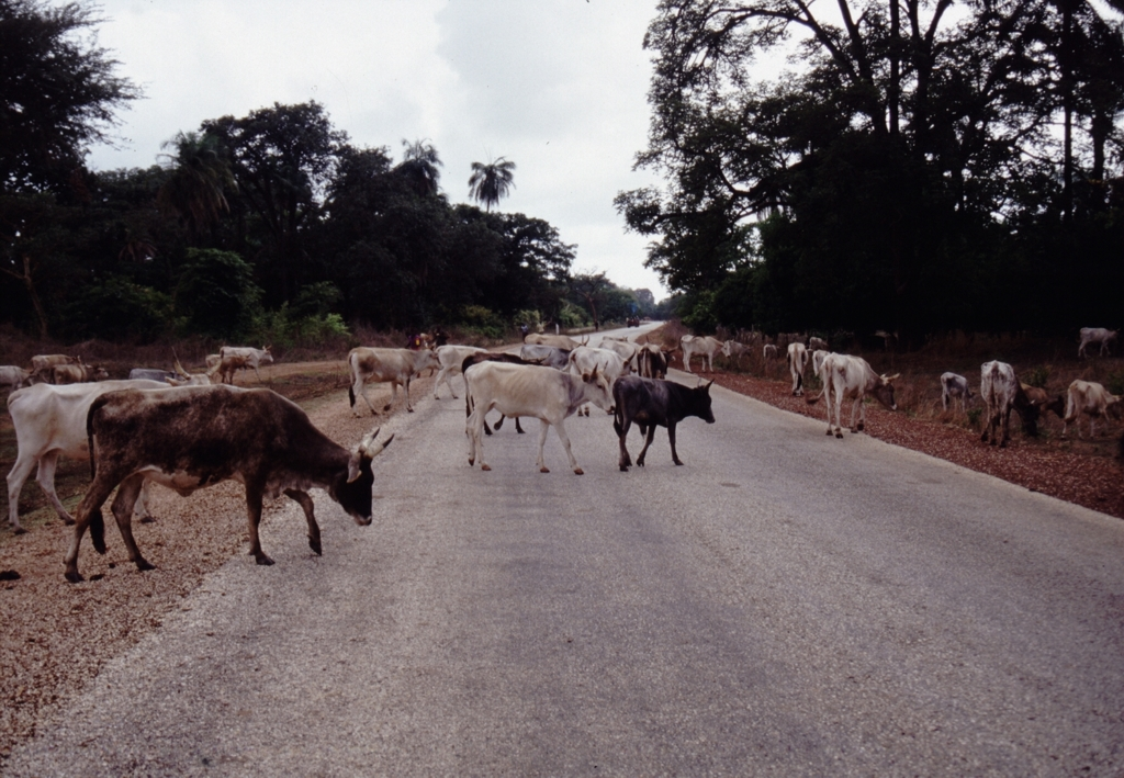 Straße Richtung Tanji, Rinder sind eine große Gefahr für Autofahrer, da sie ohne Vorwarnung auf oder über die Straße laufen